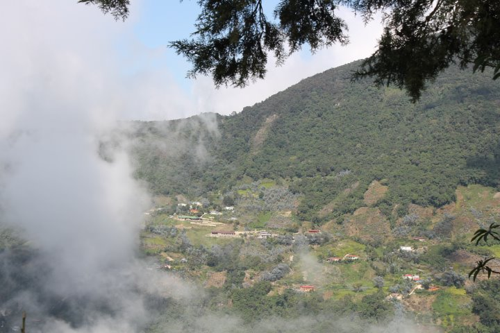 Galipan (Parque Nacional El Avila), estado Vargas - Venezuela (2008)